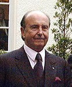 Embajador Carlos Keller Sarmiento.